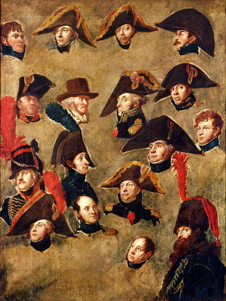 Gérard van der Puyl (1750-1824) Généraux et officiers du camp de Boulogne, 1804 Musee des Beaux-Arts et de la Dentelle, Calais, France